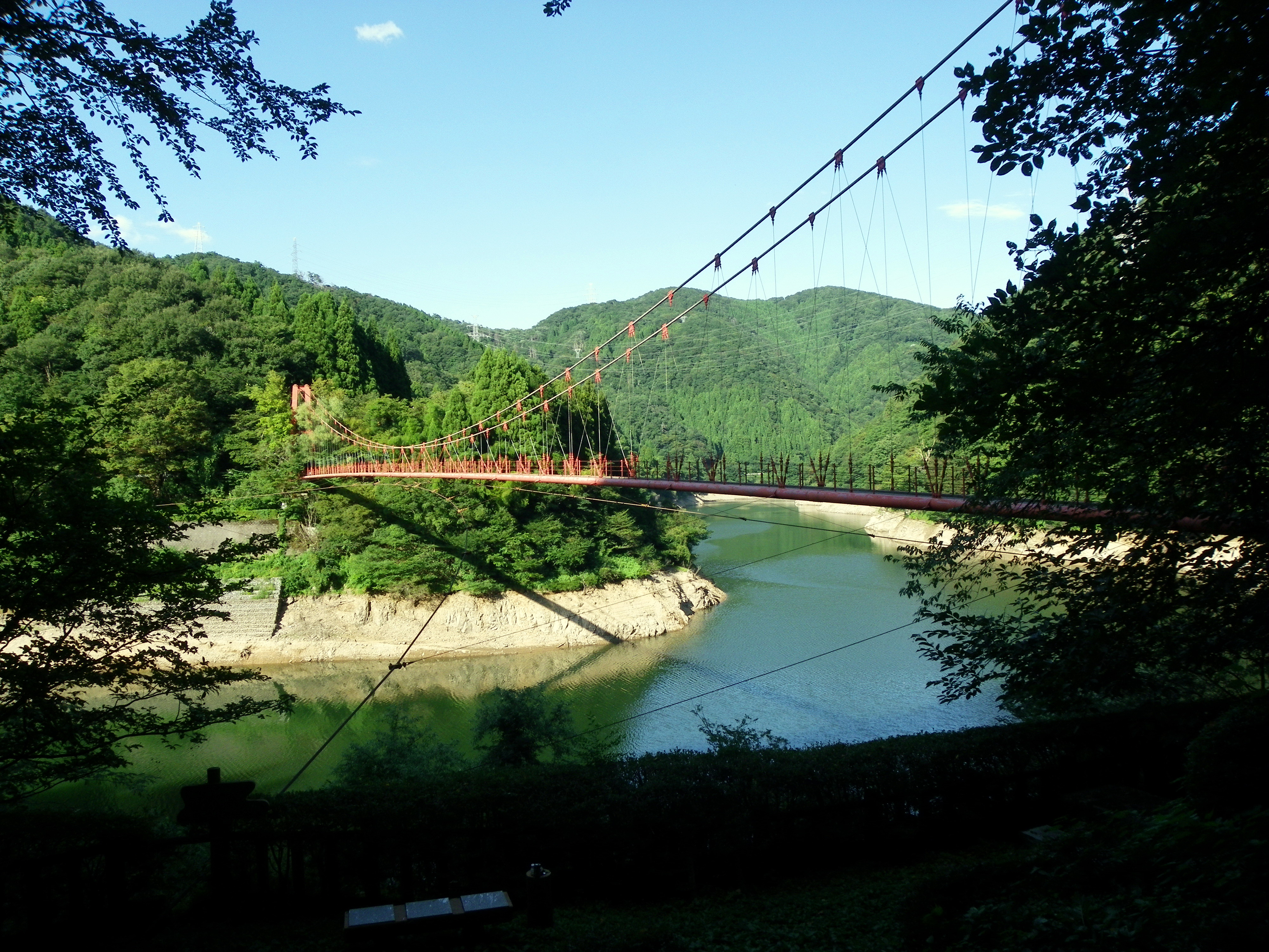 我谷ダム湖にある我谷吊橋（渡った後振り返って）